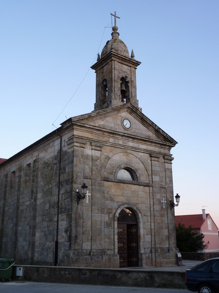 Igrexa de Palmeira, Ribeira